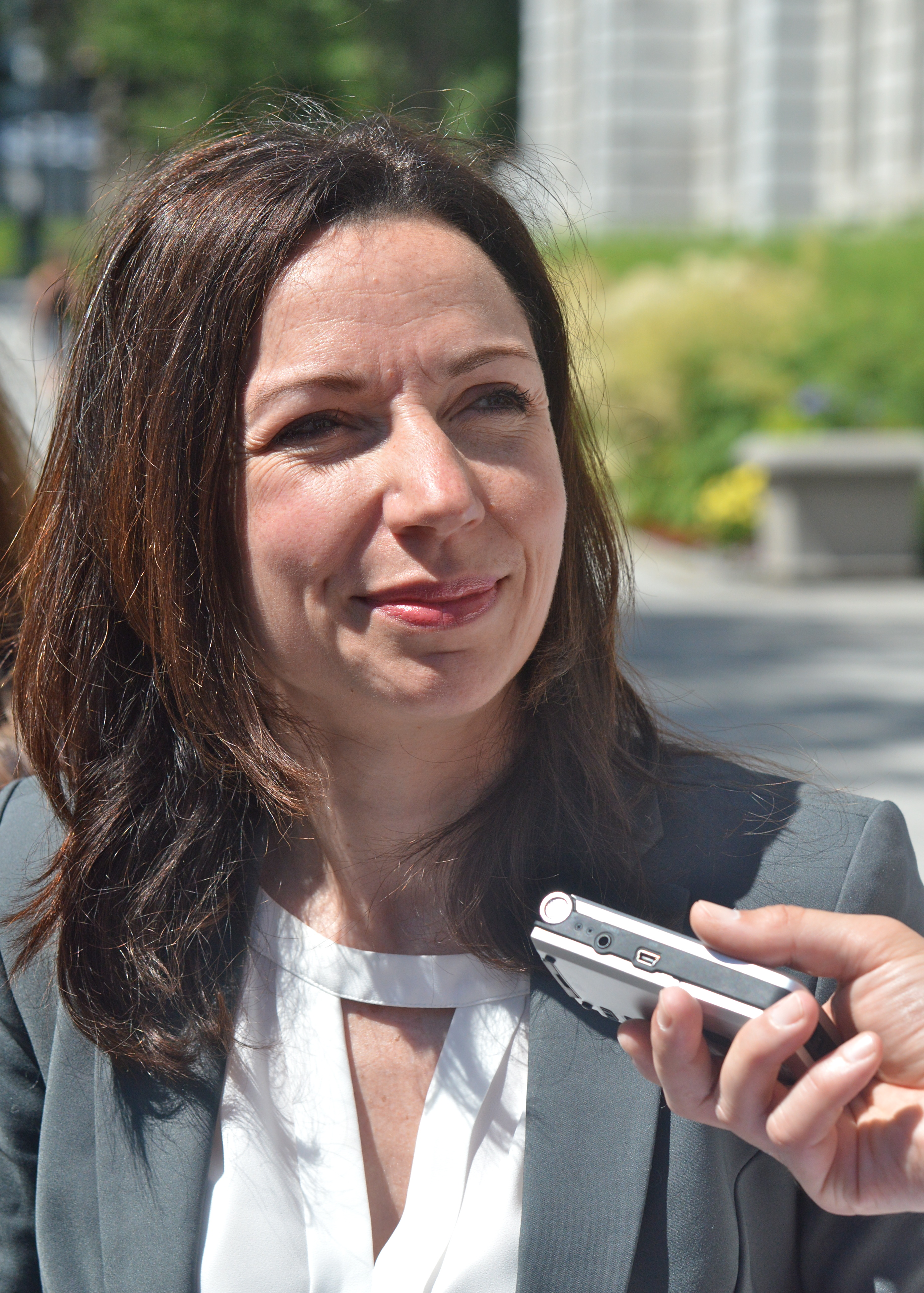 Martine Ouellet près de l'édifice de l'Assemblée nationale